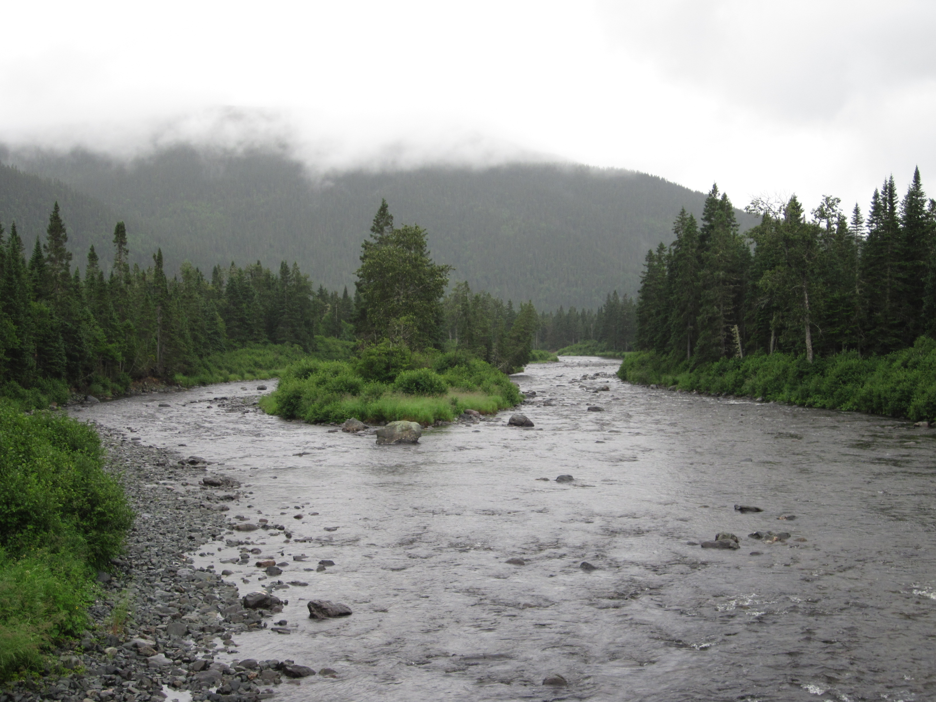 Rivière Cascapédia suite à la confluence du ruisseau aux Saumons, dans le parc national de la Gaspésie